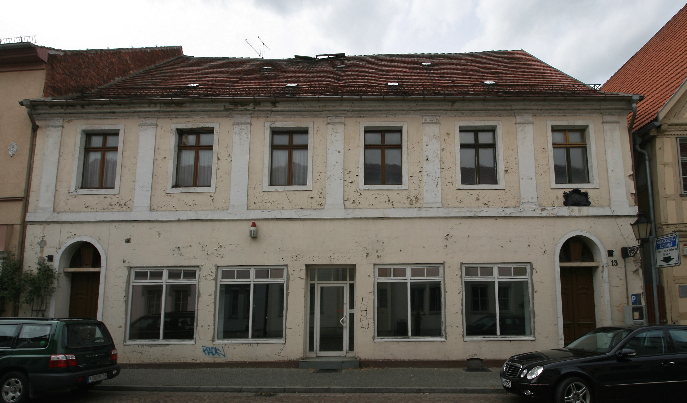 Wohnhaus Lange Straße 13 in Havelberg. Denkmal-ID 094 98202 000 000 000 000. Relief über dem rechten Hauseingang: Königl. Preuß. Privilegirtes Freÿ Hauß Anno 1759.